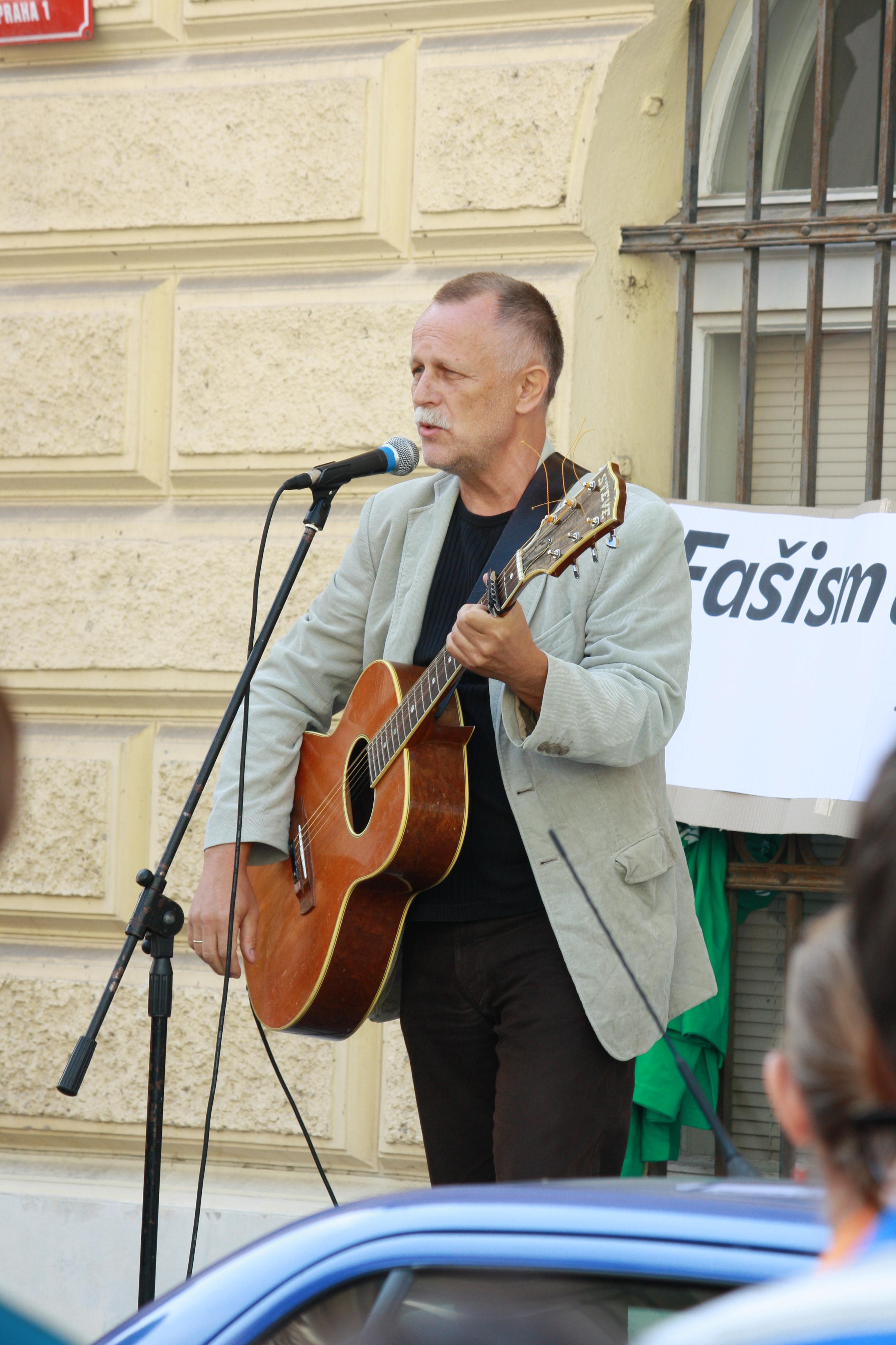 Ve čtvrtek 1. září 2011 přišly demonstrovat před ministerstvo školství odhadem dvě až tři stovky lidí proti působení Ladislava Bátory na úřadu. Protestní akci pořádala ve spolupráci s nevládními organizacemi Strana zelených. Její předseda Ondřej Liška varoval před růstem pravicového extremismu a rasismu ve společnosti a jeho pronikání do politiky. Kromě něj promluvili mimo jiné předseda Židovské obce v Praze František Bányai a iniciátor petice Ne Bátorovi Radek Matuška. Sám Bátora na chvíli vyhlédl z okna ministerstva. This photograph was taken with a DSLR from WMCZ's Camera grant.